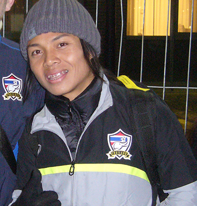 Kanjana Sungngoen